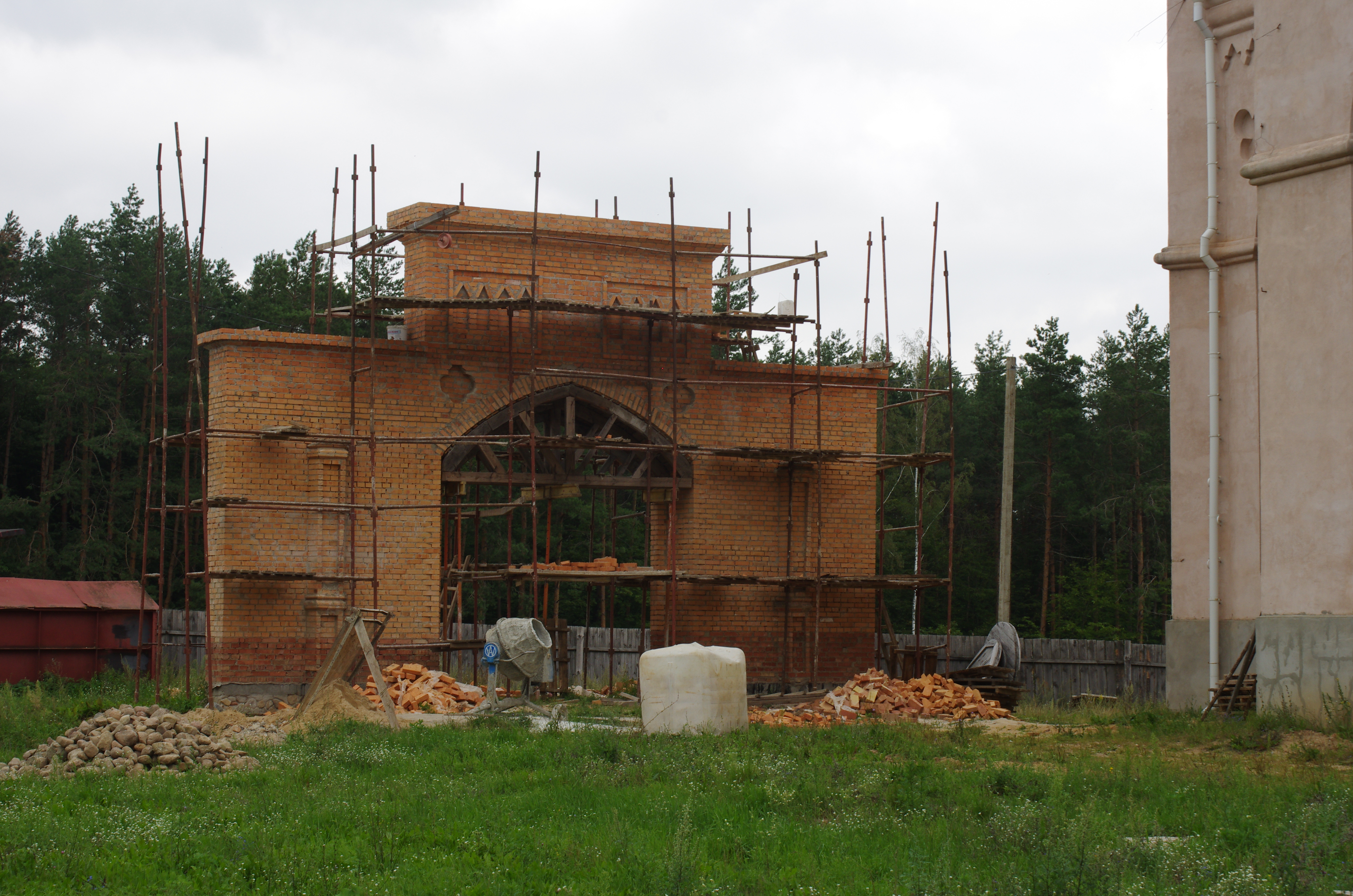 Палац Пуслоўскіх